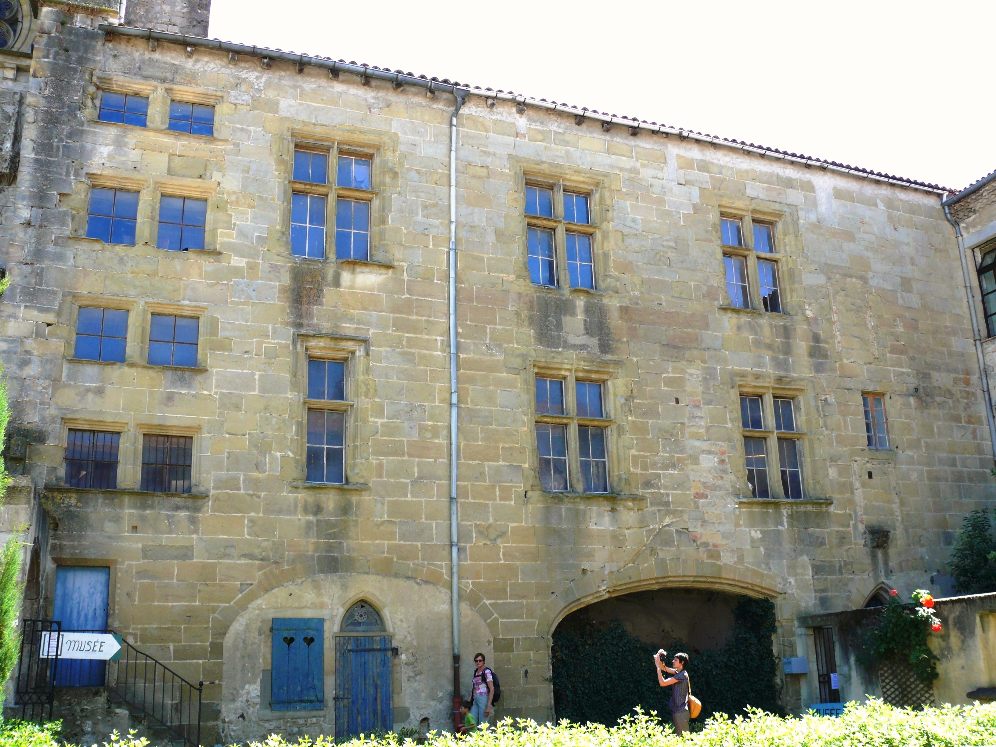 Mirepoix - Evêché et musée